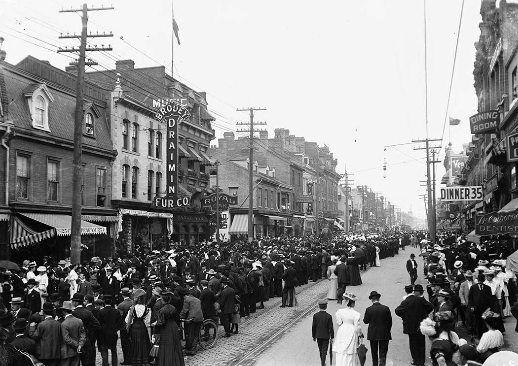 Labour Day parade (Toronto, Canada)